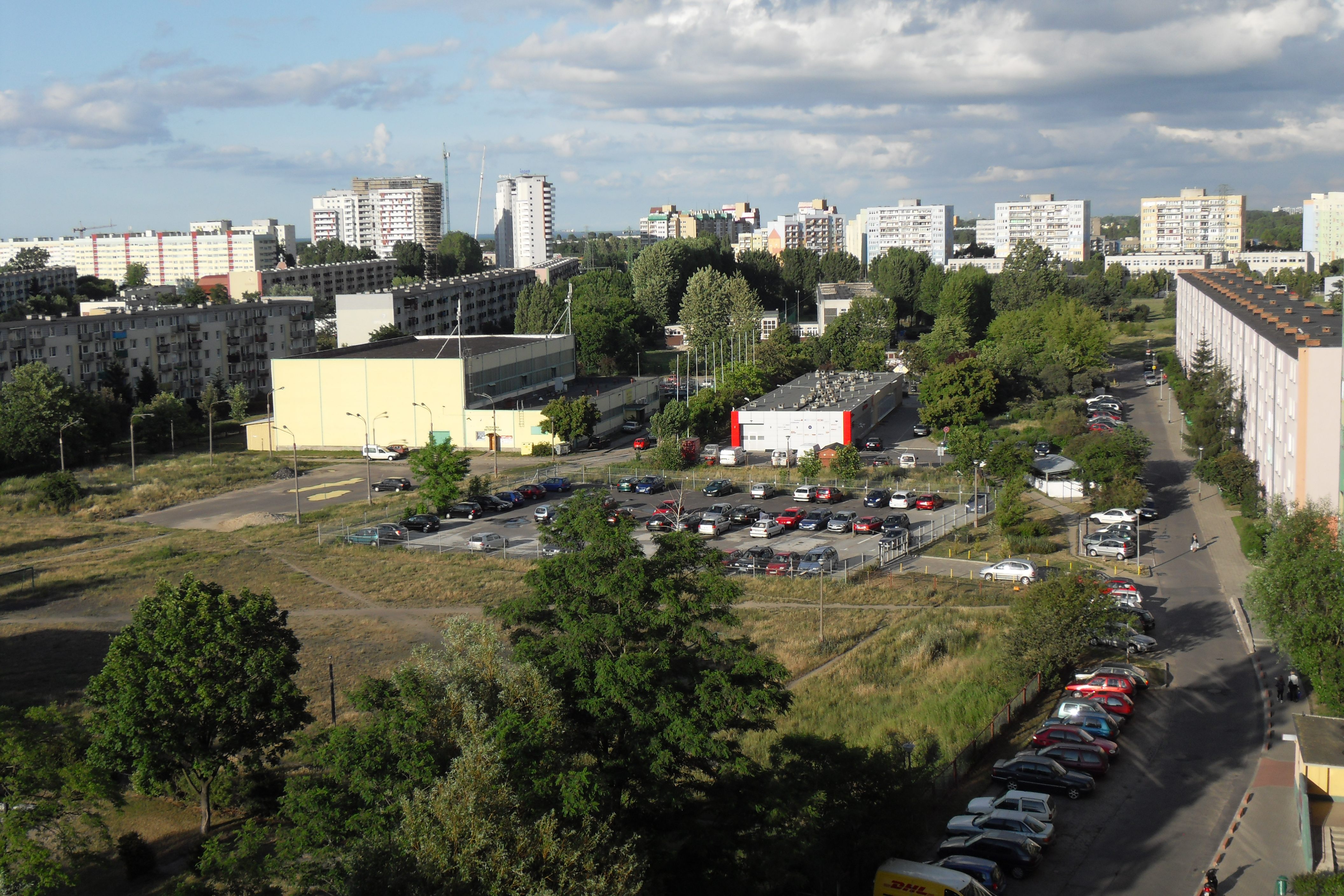 Gdańsk Przymorze.